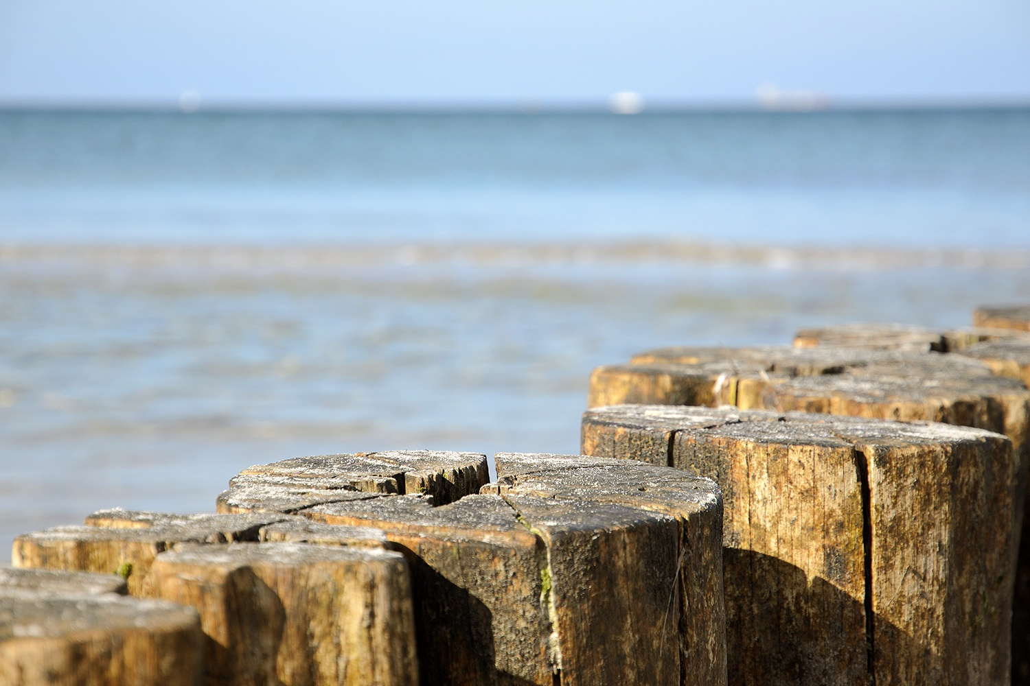 Warnemünde, Mecklenburg-Vorpommern, Datum/Uhrzeit: 03.10.2013 13:40:42